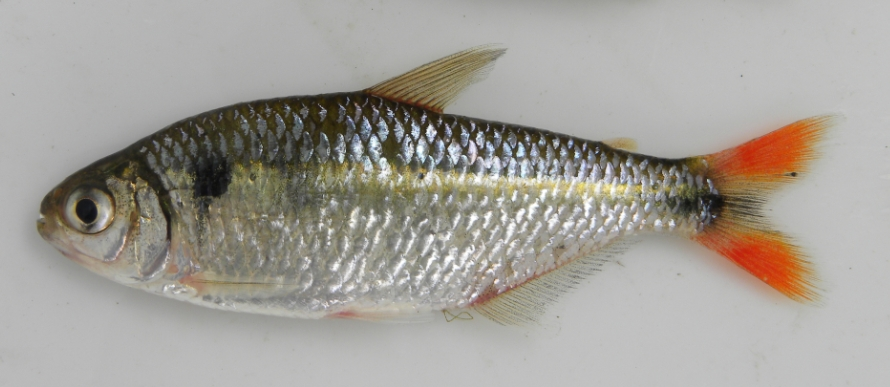 Hyphessobrycon togoi